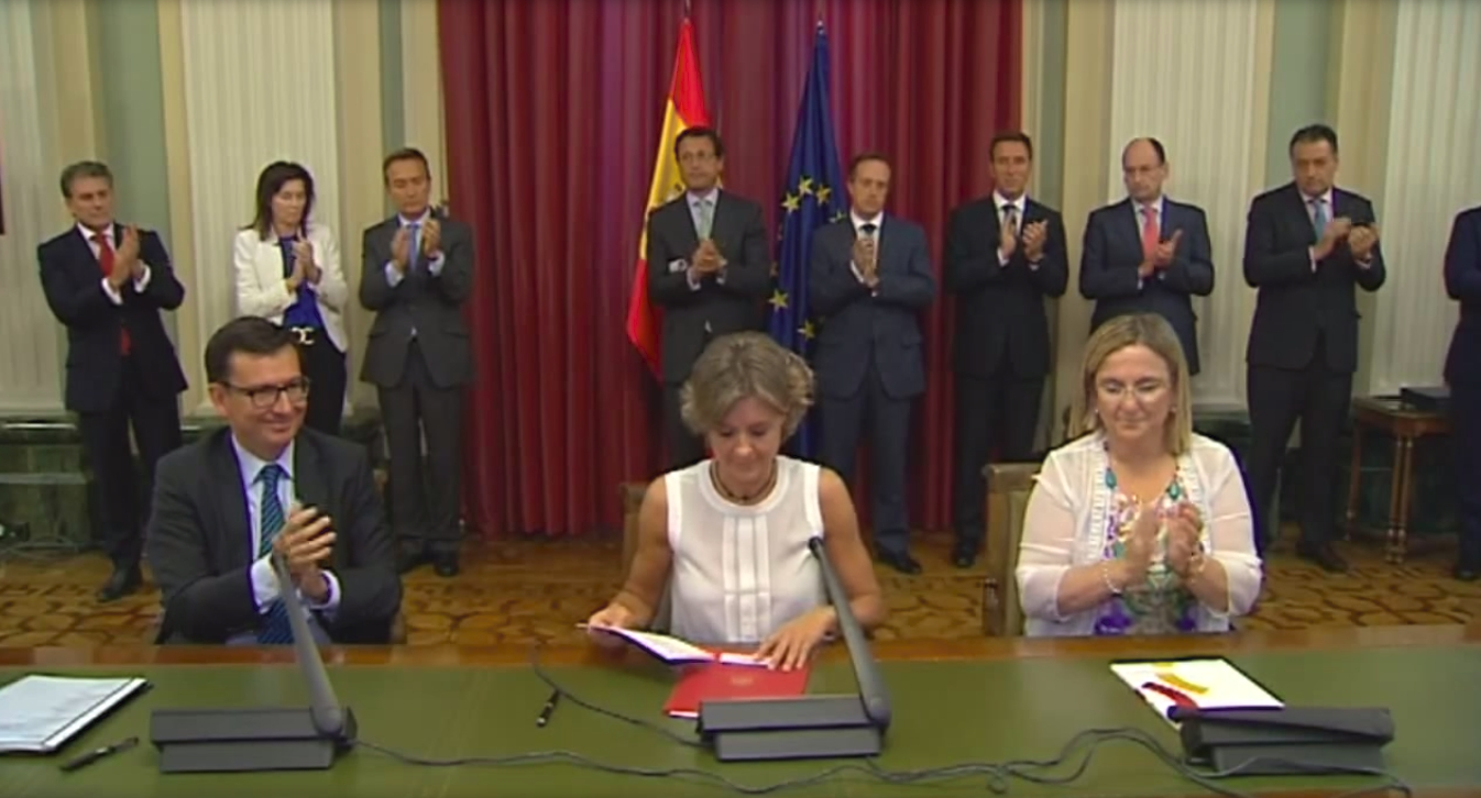 La ministra de Agricultura, Alimentación y Medio Ambiente, Isabel García Tejerina ha presidido, en la sede del Ministerio, la firma de los convenios de colaboración del Banco Europeo de Inversiones (BEI), con el Instituto de Crédito Oficial (ICO) y siete entidades bancarias para poner a disposición del sector agroalimentario un total de 1.200 millones de euros, “que contribuirán a dinamizar el sector y a la creación de empleo”.